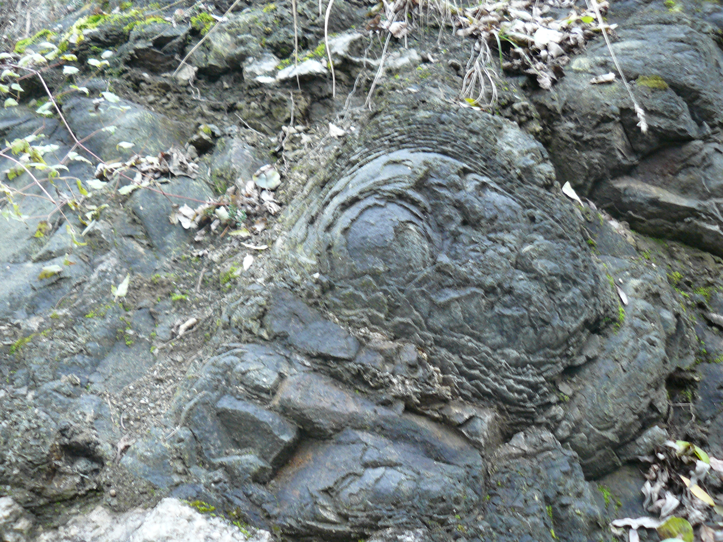 Kulovitý rozpad diabasu tvořící "chuchelské růžičky"